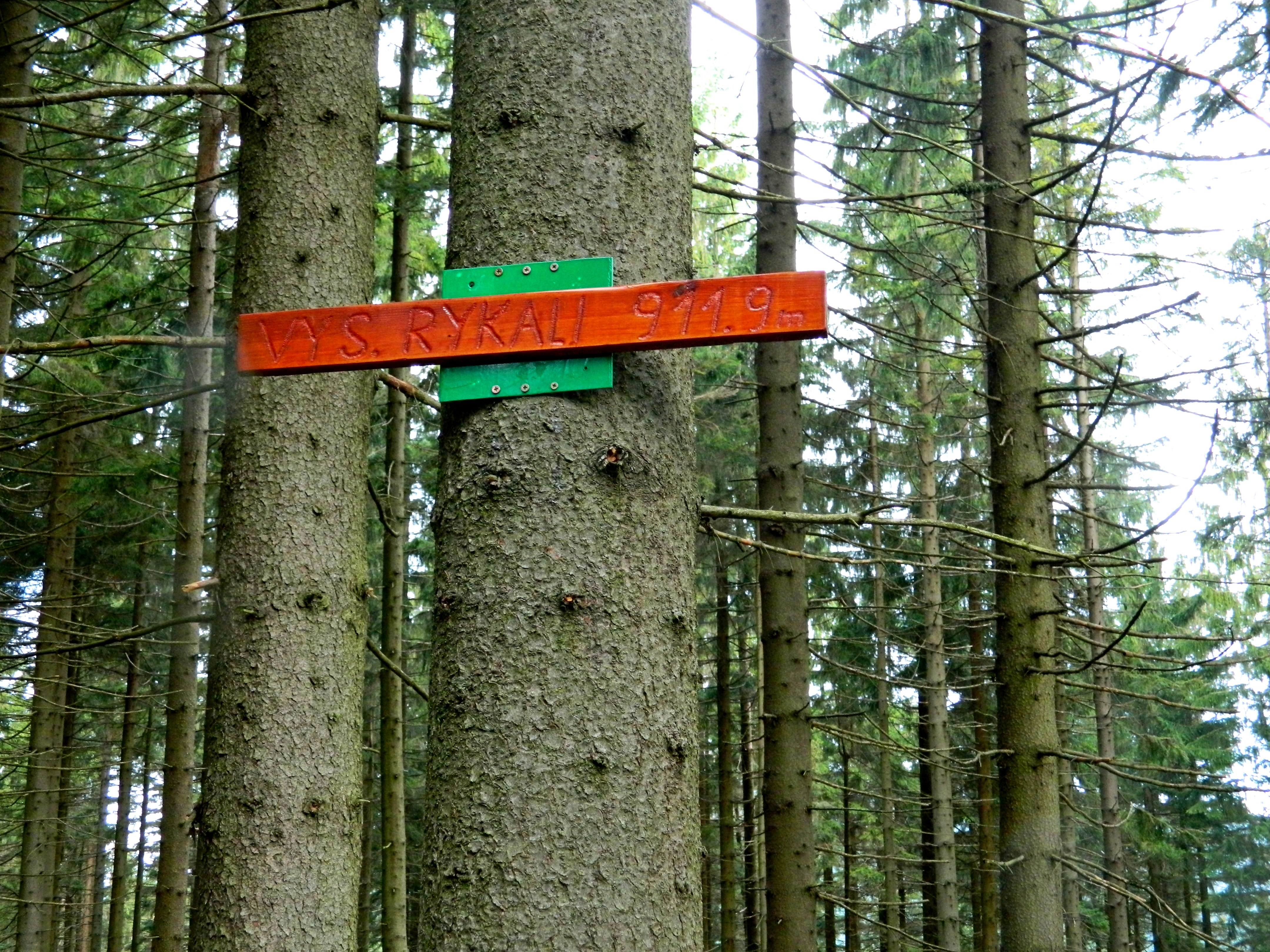 Jednoduchá cedule na vrcholu Vysokého Rykali v Moravskoslezských Beskydech